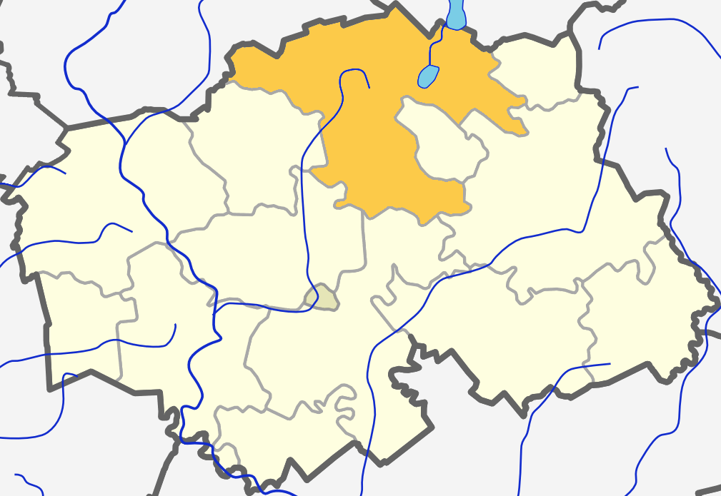 Расположение Лаукувского староства на карте Шилальского района